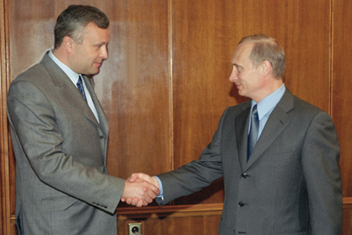 МОСКВА, КРЕМЛЬ. С президентом Национального резервного банка Александром Евгеньевичем Лебедевым.